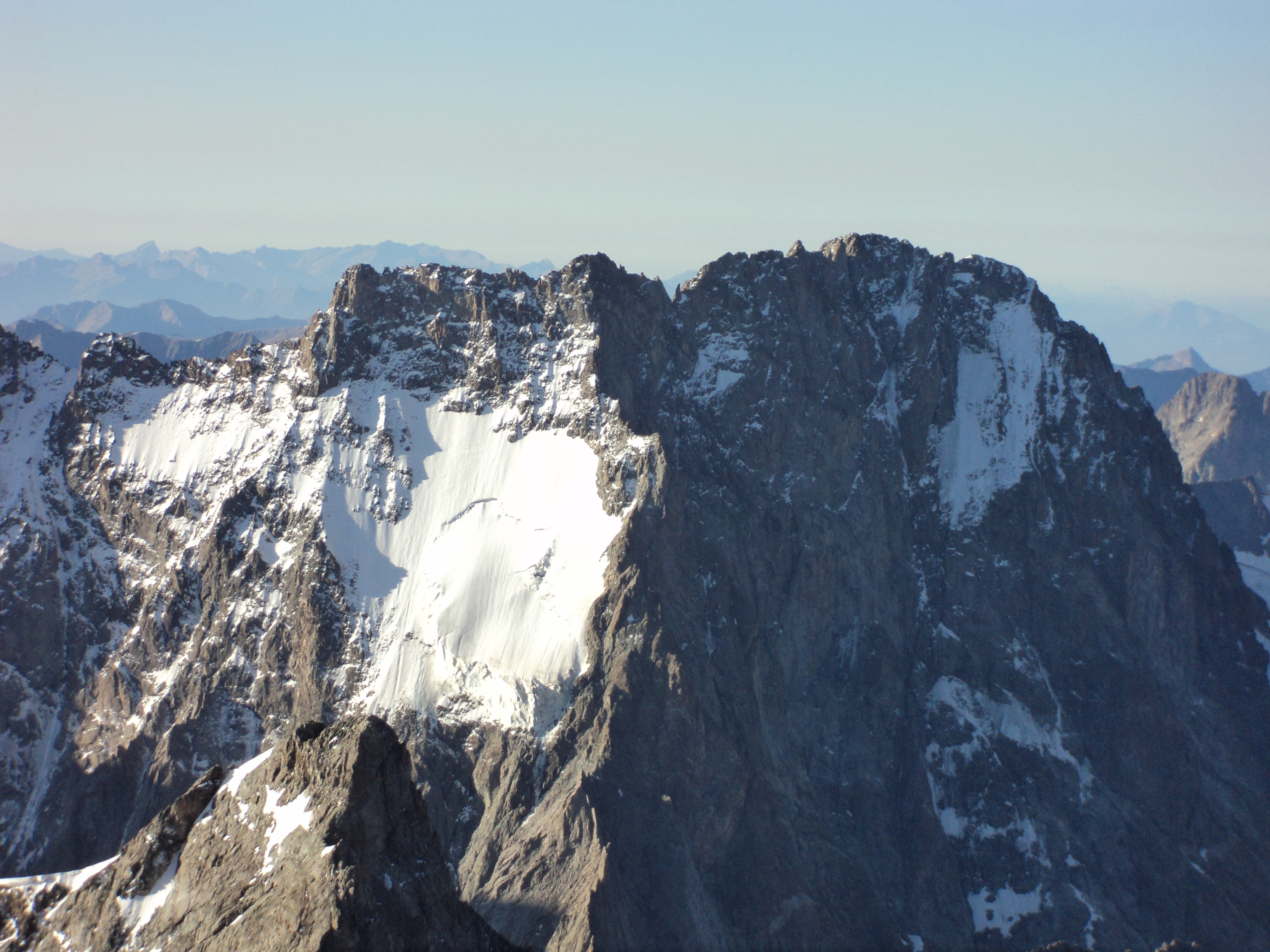 L'Ailefroide visto dal Dome de Neige des Écrins - Massicio des Écrins - Alpi del Delfinato - Francia